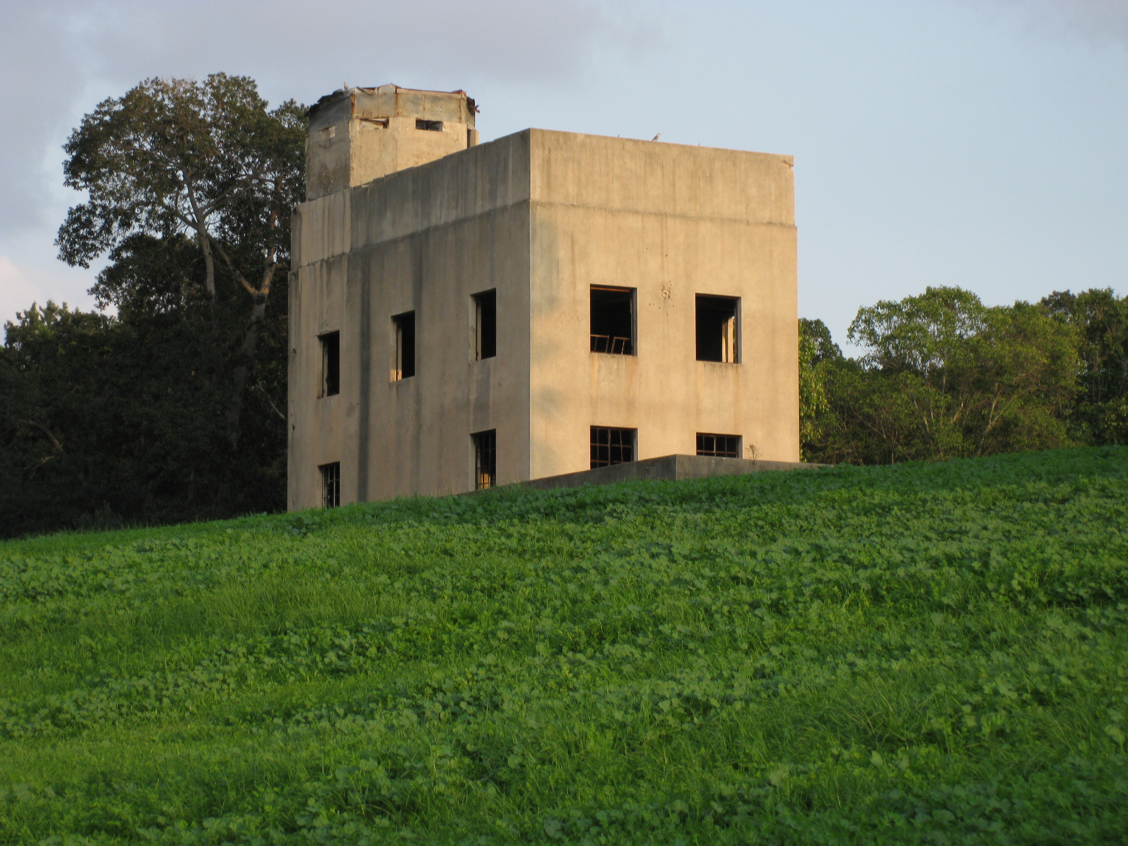 Tel Afek תל אפק גן לאומי ירקון